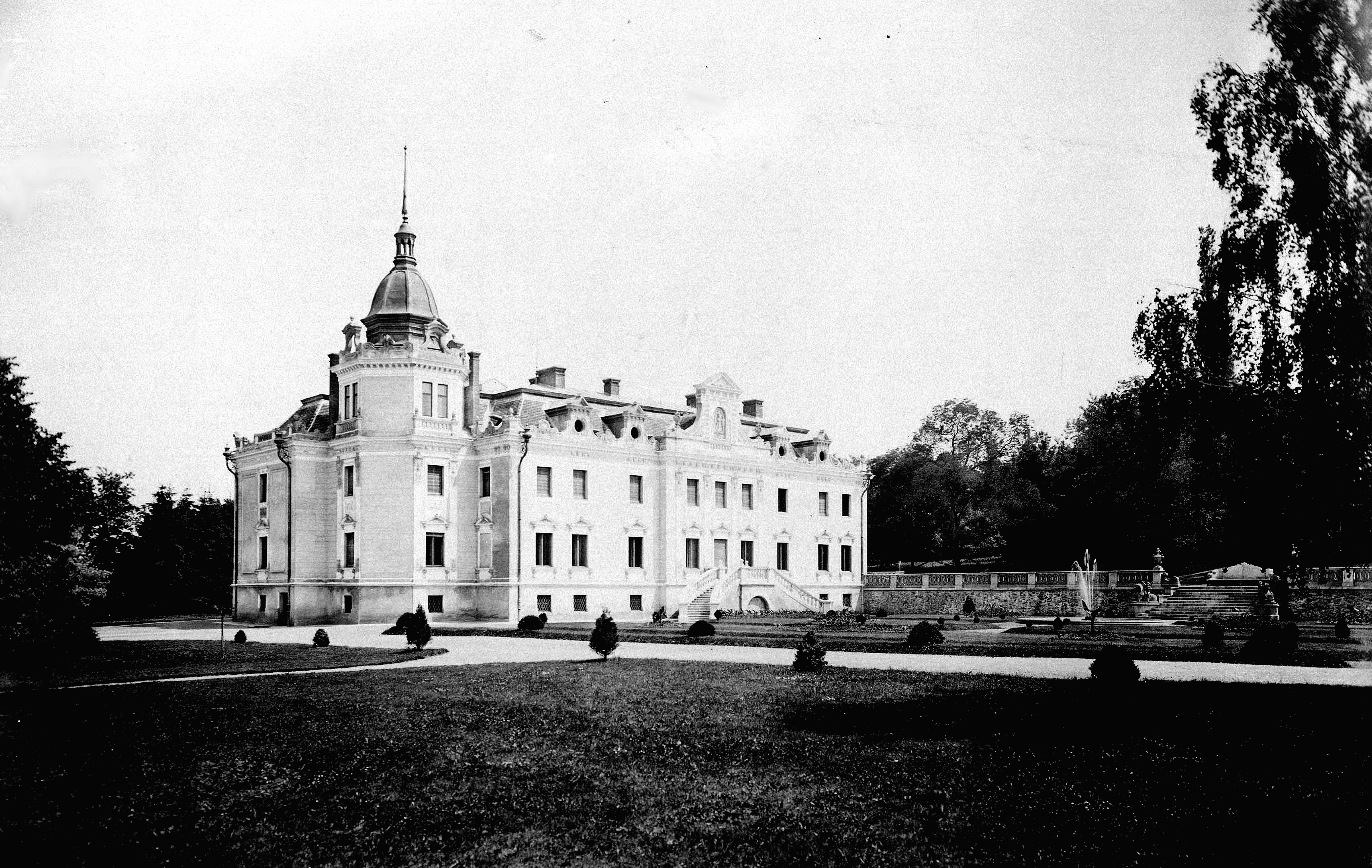 SOROKPOLÁNY Sorokújfalu (ekkor önálló, ma a község része), a Szapáry-kastély oldalnézete. A felvétel 1895-1899 között készült. A kastélynak, mint sok másiknak Magyarországon elég hányattatott sorsa volt. Már az 1300-as években van említés egy ilyesfajta épületről a környéken, de az első biztos tulajdonost 1644-ben említik, ekkor a Bátsmegyey-ek kezén volt a birtok. Majd tőlük átkerült a Rumy család birtokába, akiktől pénzügyi gondjaik miatt a Mikosok vették meg. Ettől a családtól vásárolta meg aztán Szapáry Géza gróf 1891-ben. Az évszázadok folyamán a kastély sok átépítésen esett át. A kastélyt Szapáry család hatalmas költekezései miatt kénytelen volt eladni Gött Gyulának, akitől aztán báró Haupt-Buchenrode István vásárolta meg. A II. világháború előtt a család értékeit Ausztriába menekítette. Az épületet 1945-ben kisajátították, és utána mint kórház működöt, aztán pedig volt még népi kollégium, párhelyiség, és iskola is, míg 2002-ben Kolos László meg nem vásárolta.